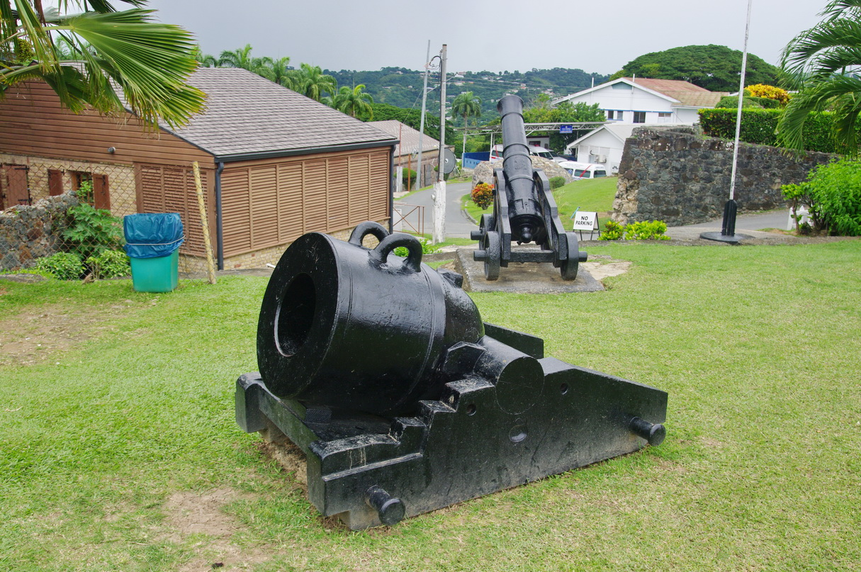 Kanone und Mörser, Fort King George, Scarborough, Tobago